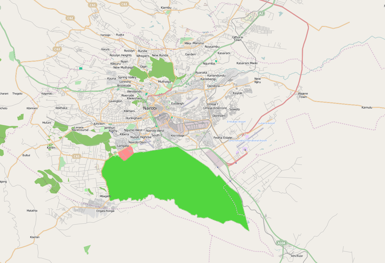 Carte de Nairobi (Kenya)